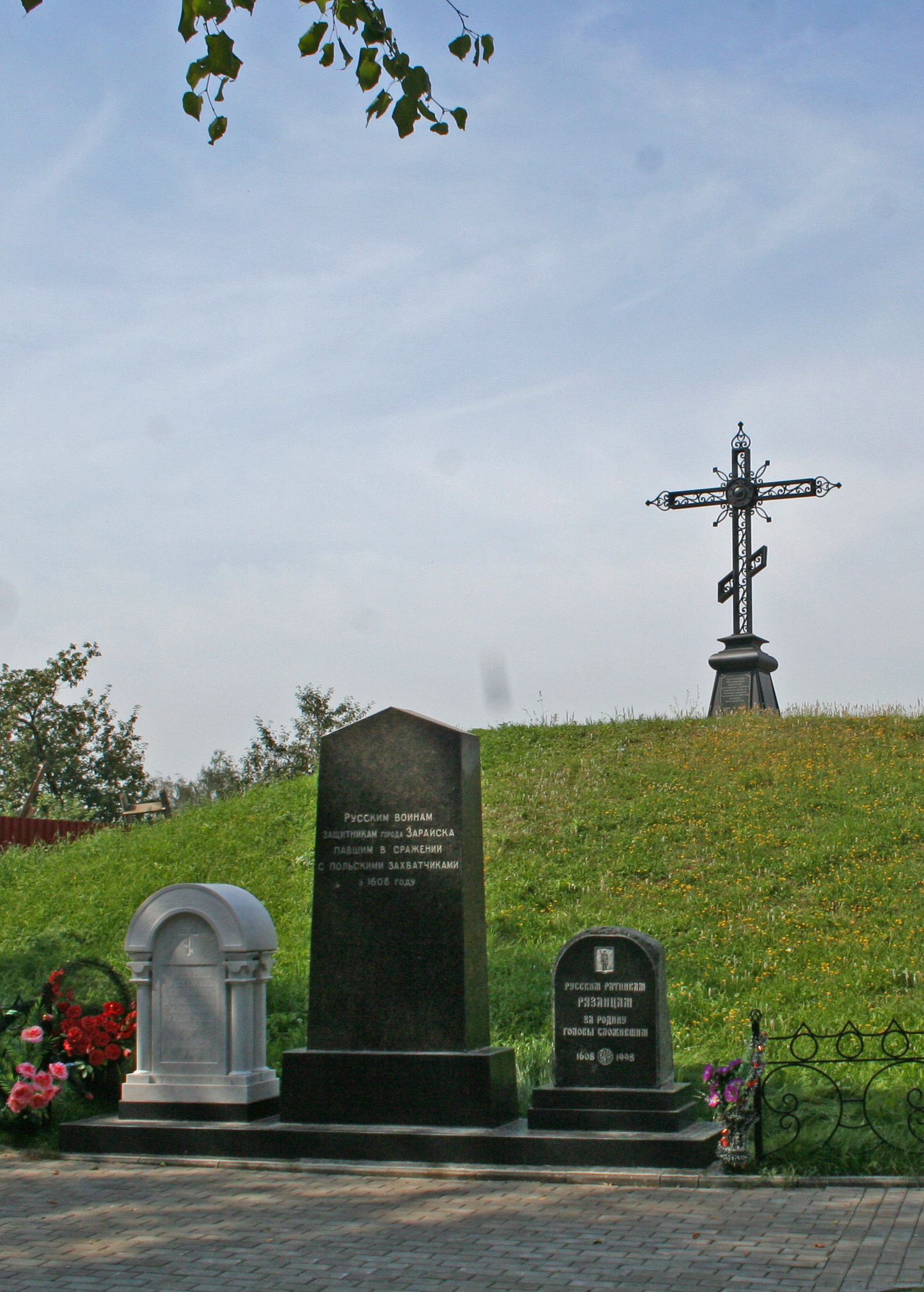 Zaraysk, Moscow Oblast, Russia